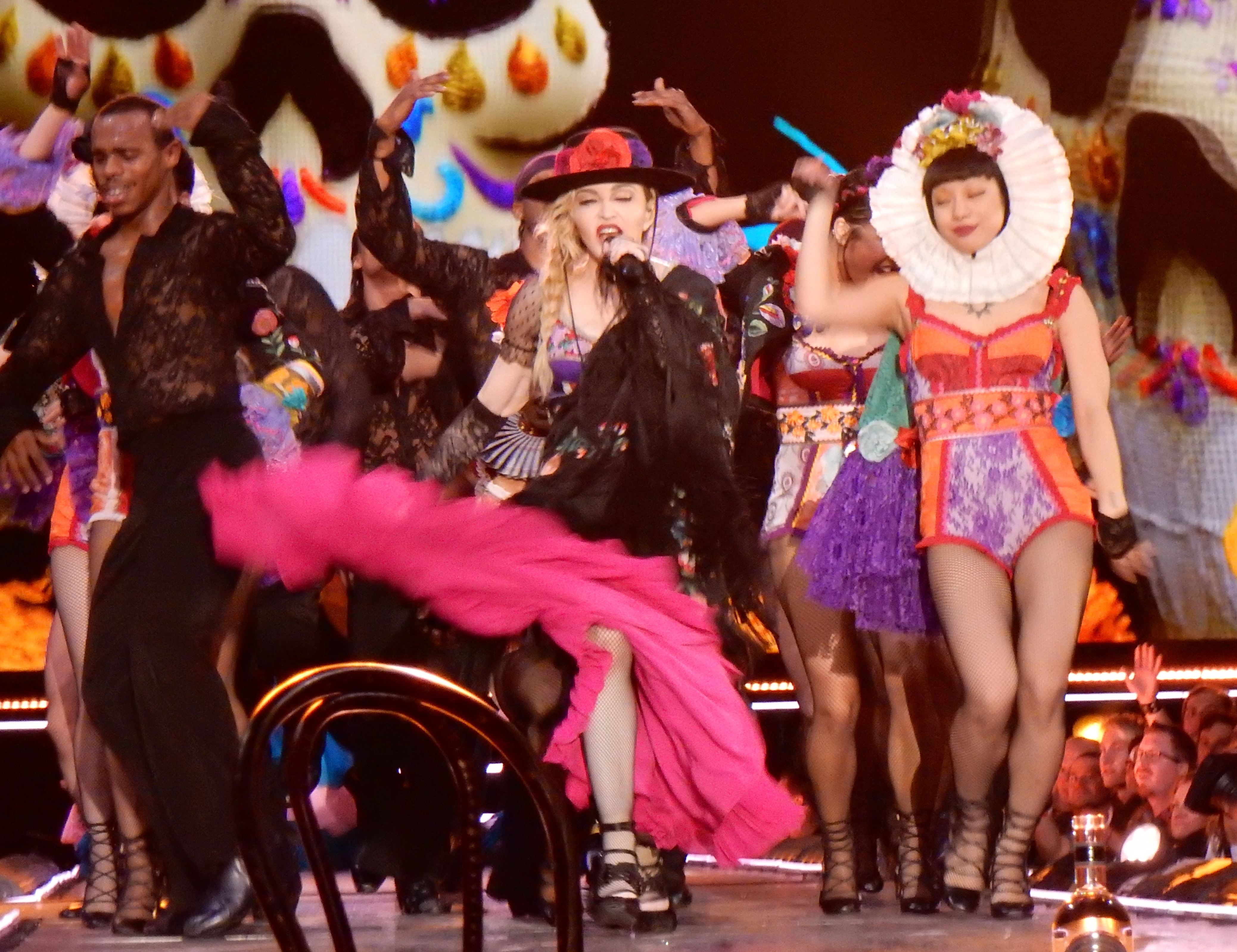 Madonna Rebel Heart Tour 2015 - Stockholm